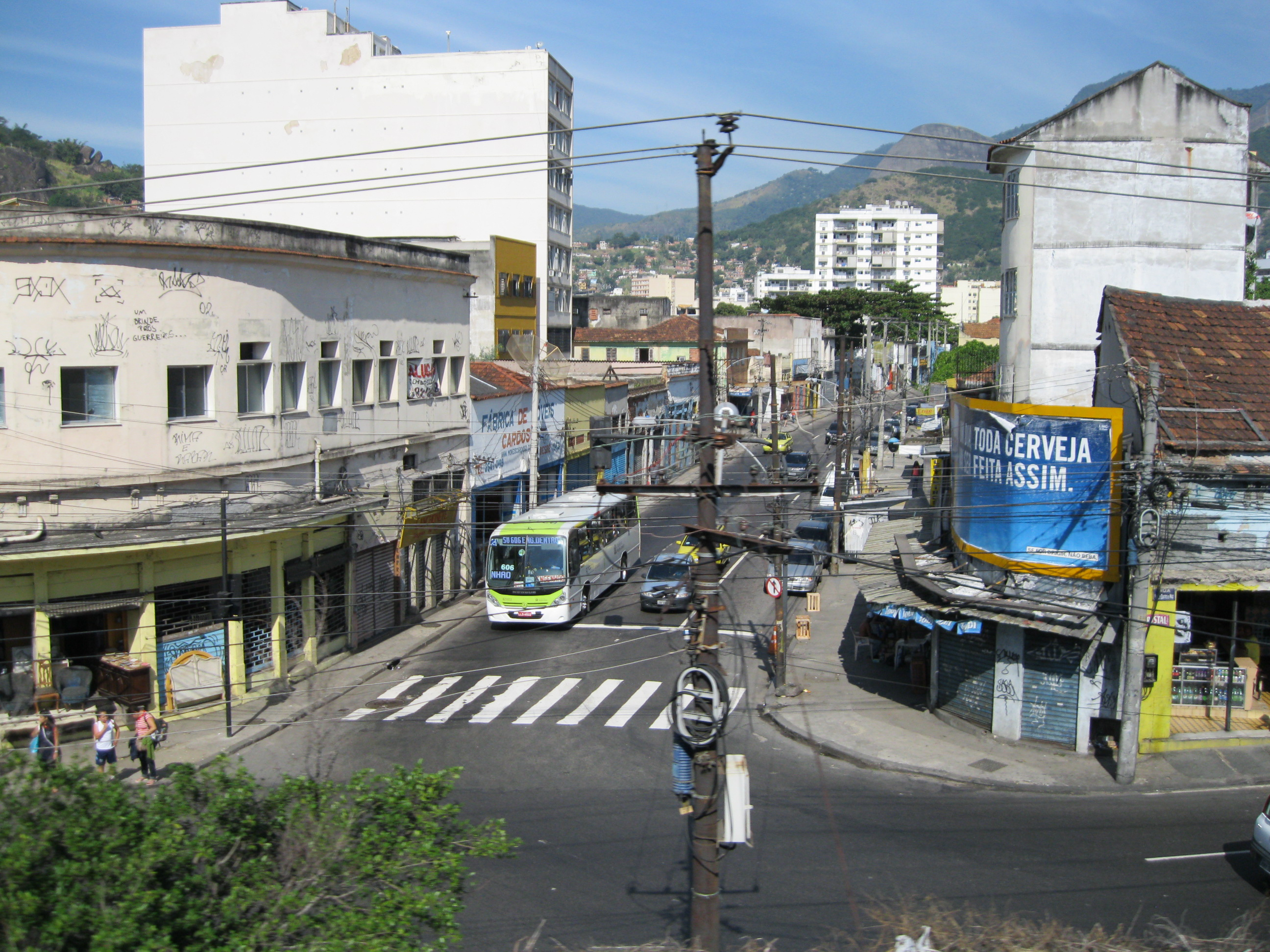 Engenho Novo, bairro localizado na zona norte da cidade do Rio de Janeiro.